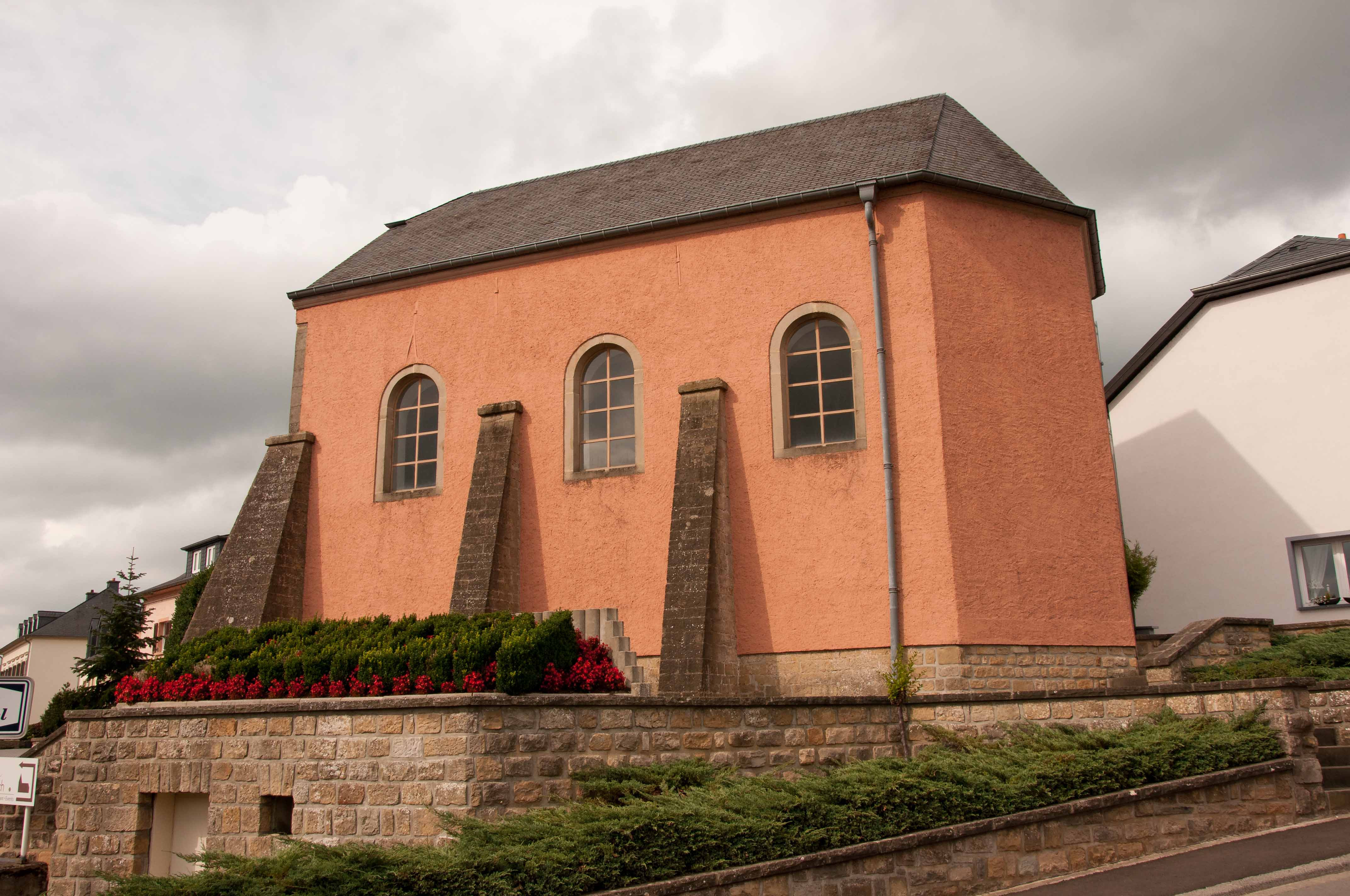 Chapelle à Beringen, Mersch